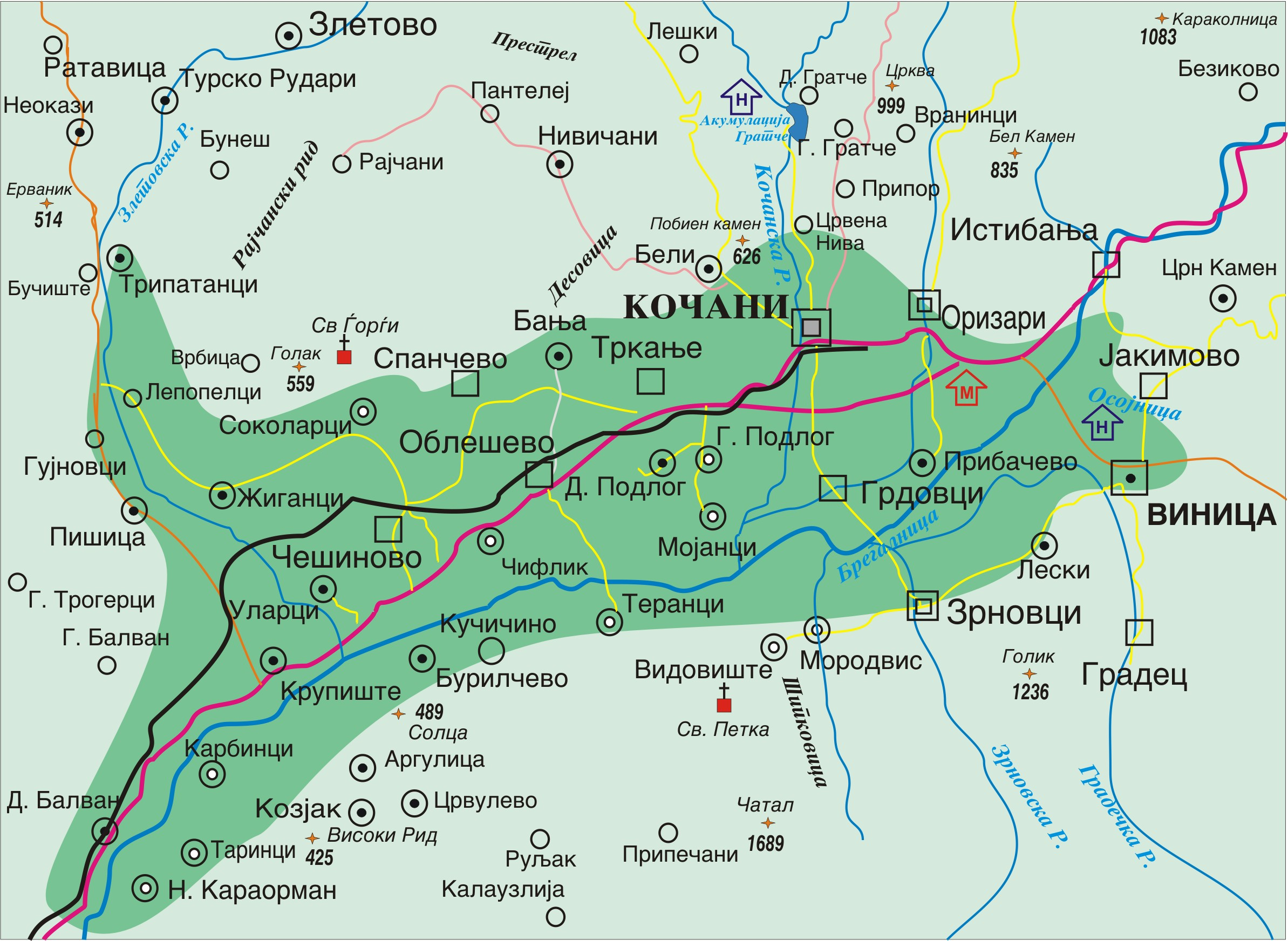 Мапа на Кочанска котлина